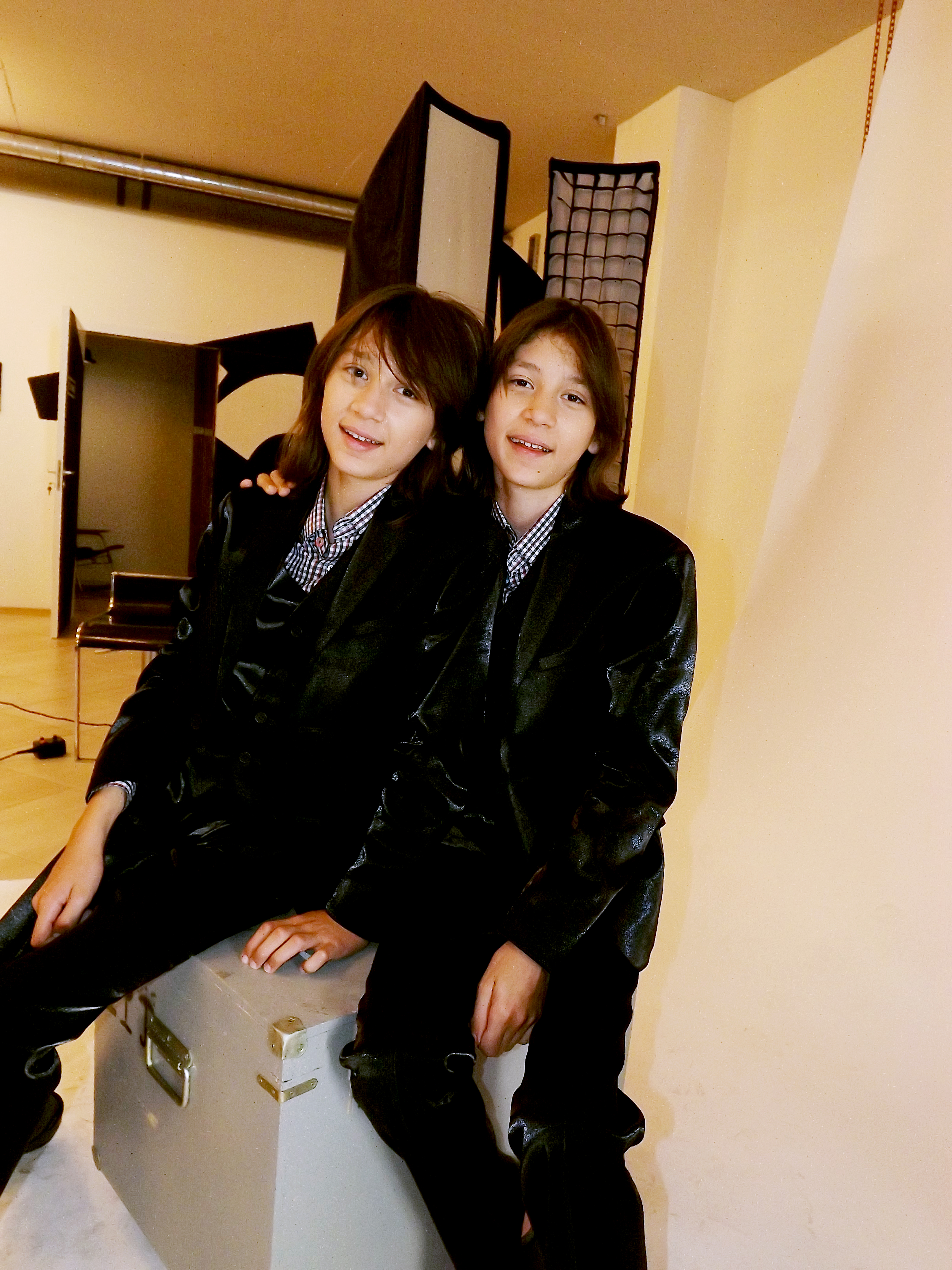 Хасан и Ибрахим - фотосесия